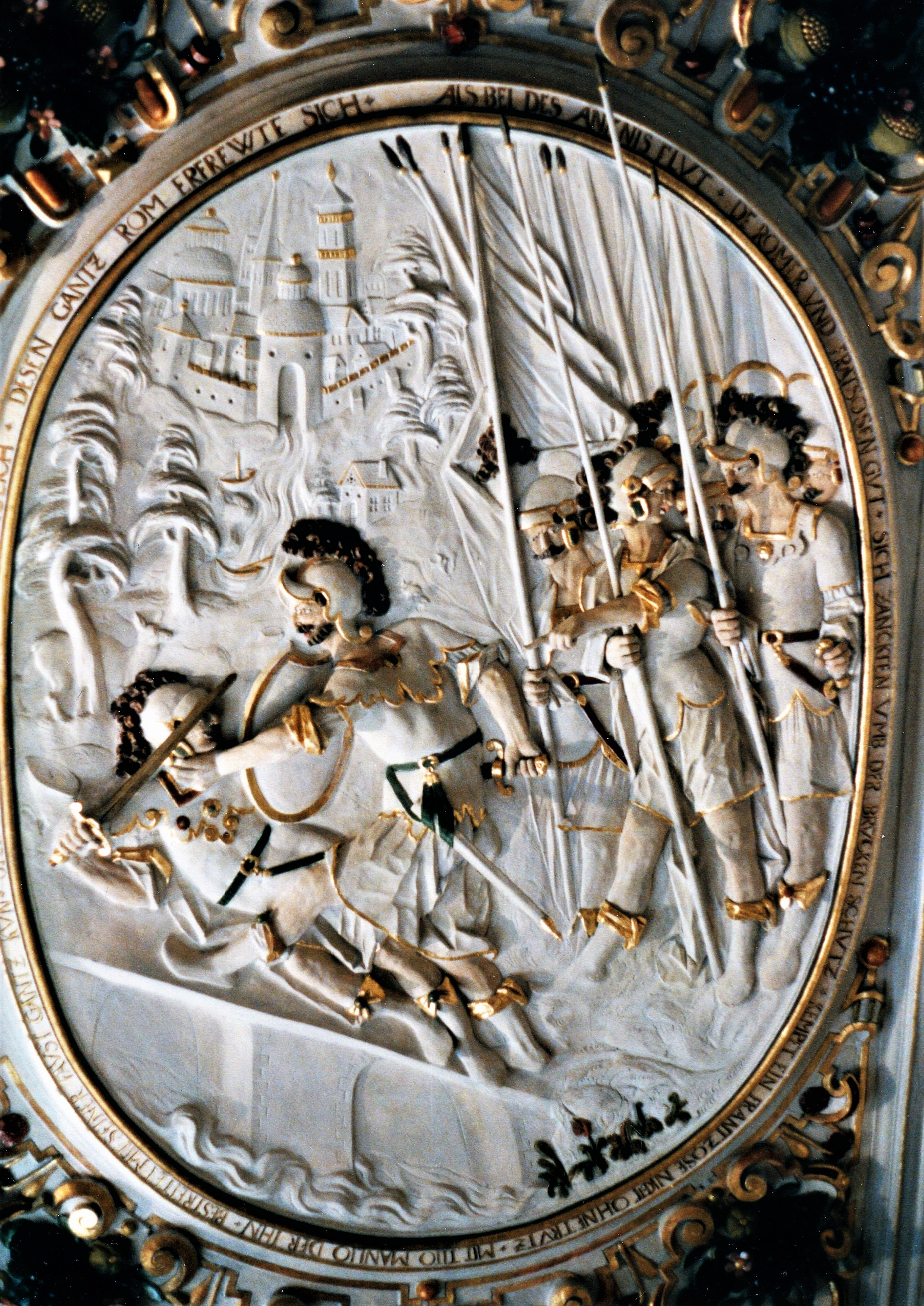 Schloss Weikersheim, Gleichenzimmer - Männer aus der römischen Geschichte, die für ihre oder des Staates Ehre ihr Leben aufs Spiel setzten, Relief von 1598: Titus Manlius